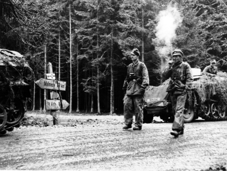 An SS-Oberscharführer and SS-Unterscharführer of 1. SS-Panzer-Division 'LSSAH', SS-Panzer-Aufklärungs-Abteilung 1, (Kampfgruppe Knittel) at the Kaiserbaracke crossroads on the road between Saint-Vith and Malmedy.